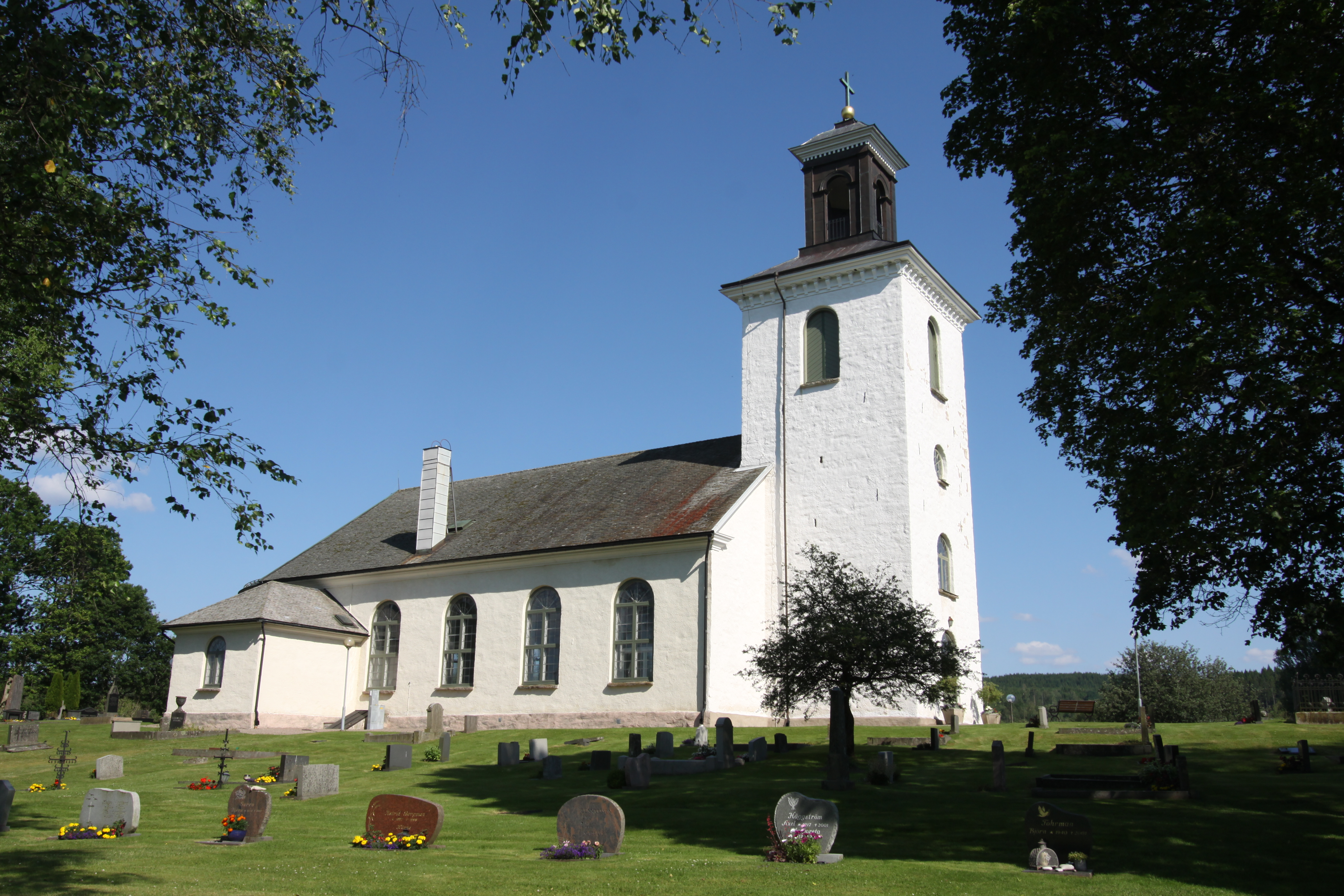 Rångedala kyrka